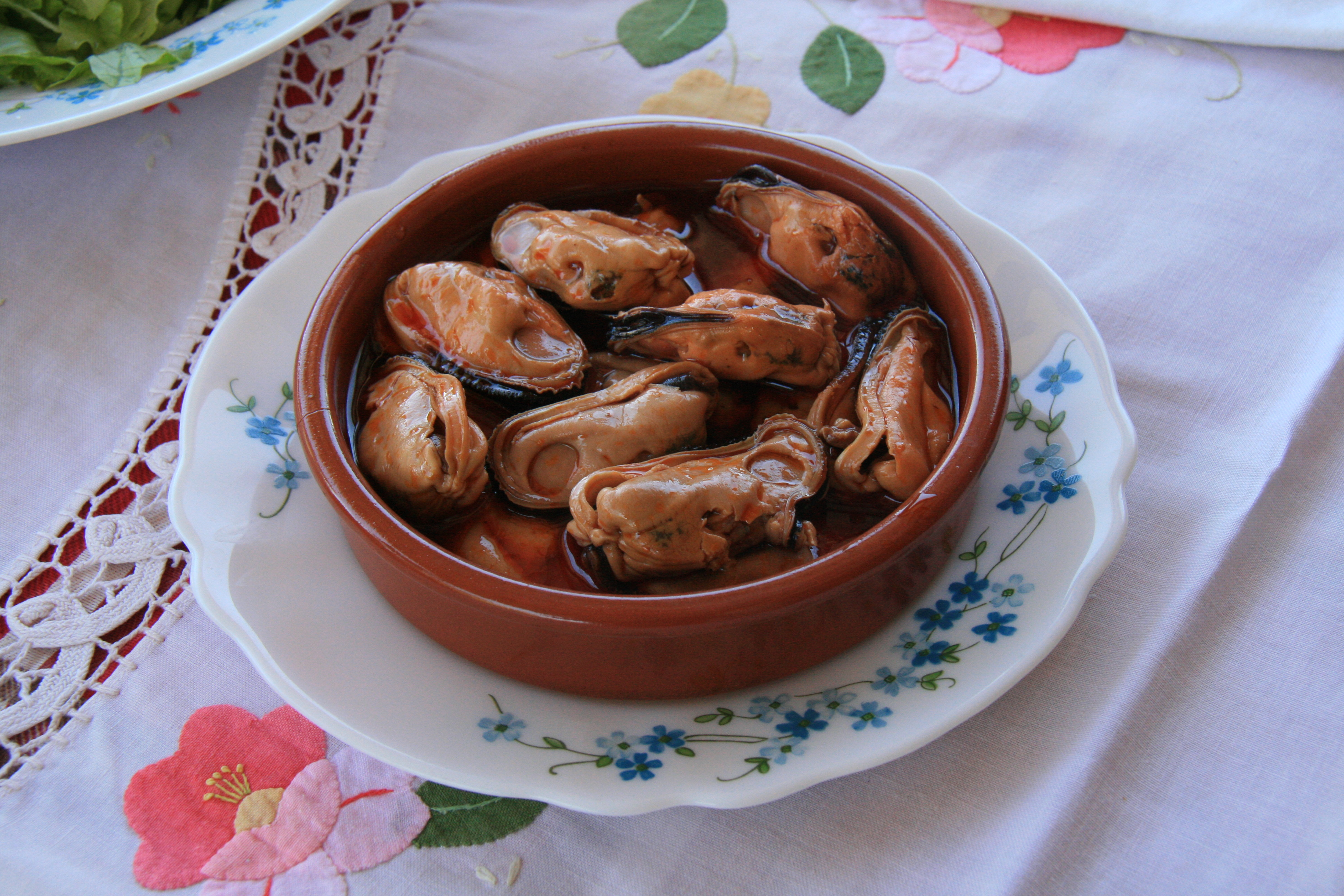 Marinierte Miesmuscheln